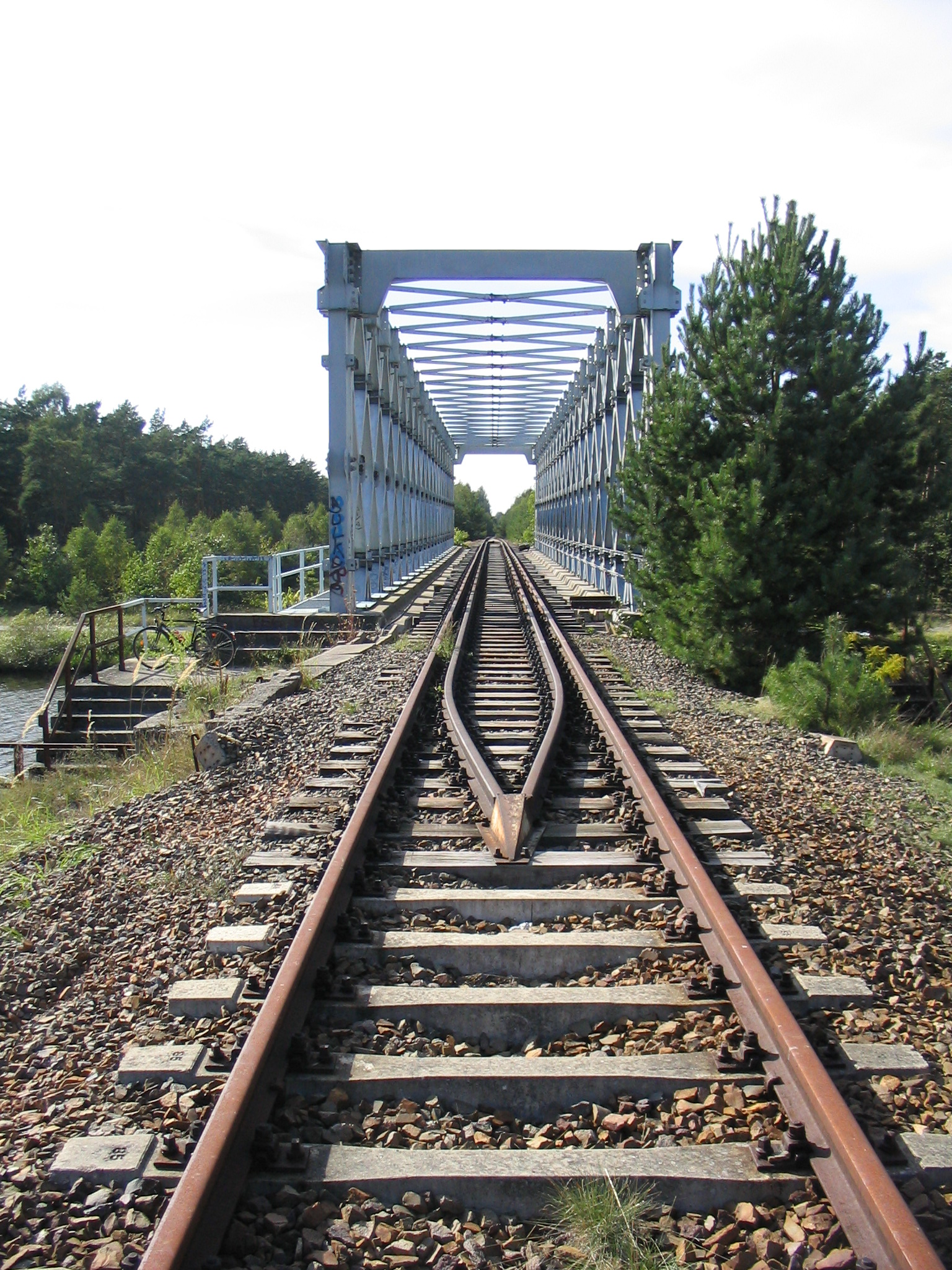 seit 2010 unter Denkmalschutz stehende Klinkerhafenbrücke, Blick nach Westen, Aufnahme aus dem Jahr 2004